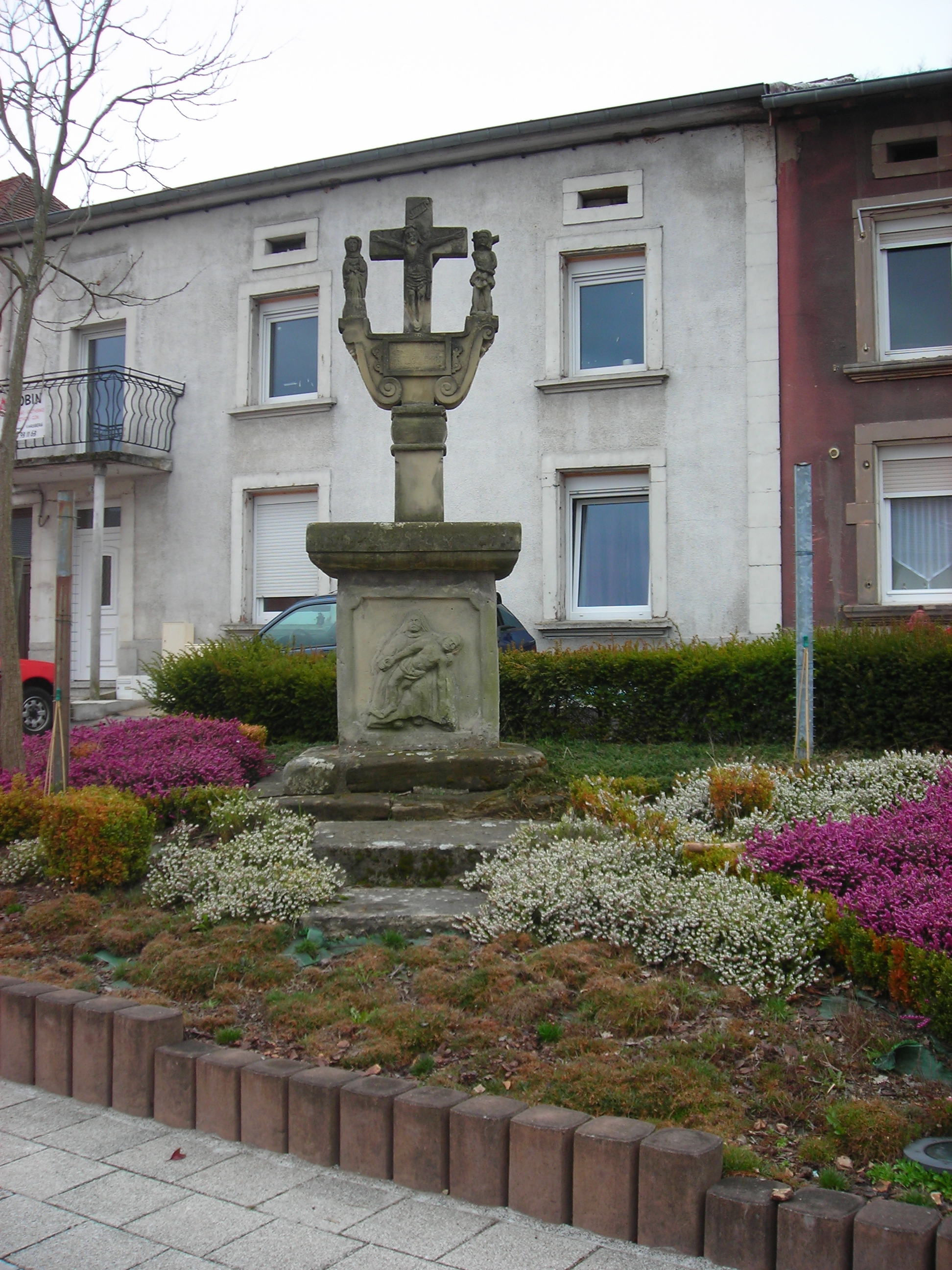 Calvaire dans la rue principale de Varsberg